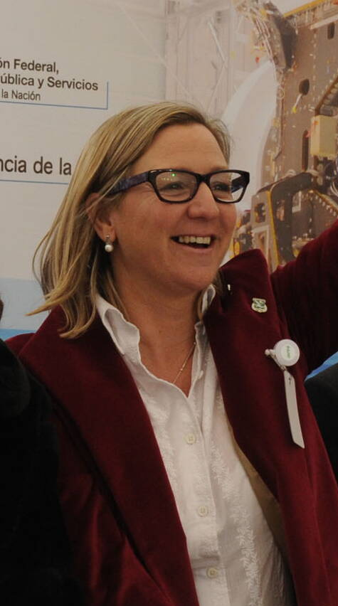 La presidenta Cristina Fernández junto a la intendenta de Bariloche, María Eugenia Martini; el titular del INVAP, Héctor Otheguy; y el ministro de Ciencia y Tecnología Lino Barañao durante la inauguración de CEATSA.